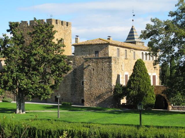 Castell de Millars a la comarca del Gironès - Catalunya